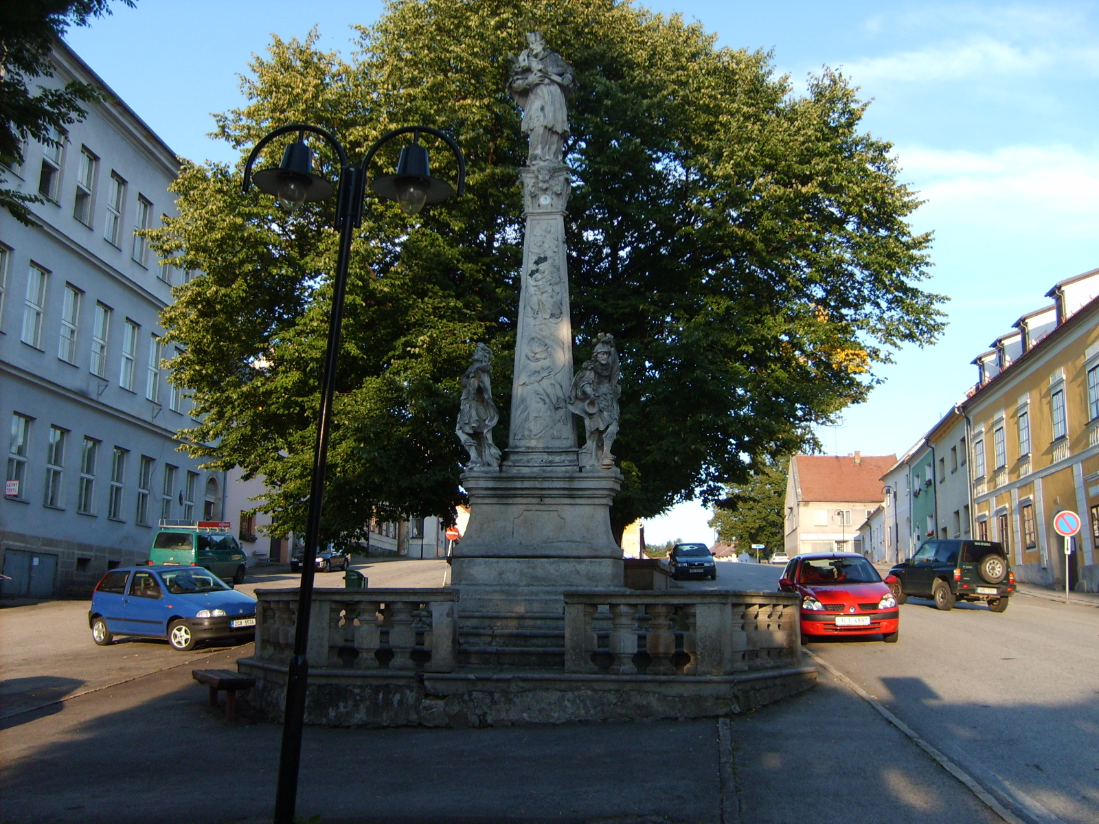 Sousoší sv. Jana Nepomuckého na náměstí v Benešově nad Černou.